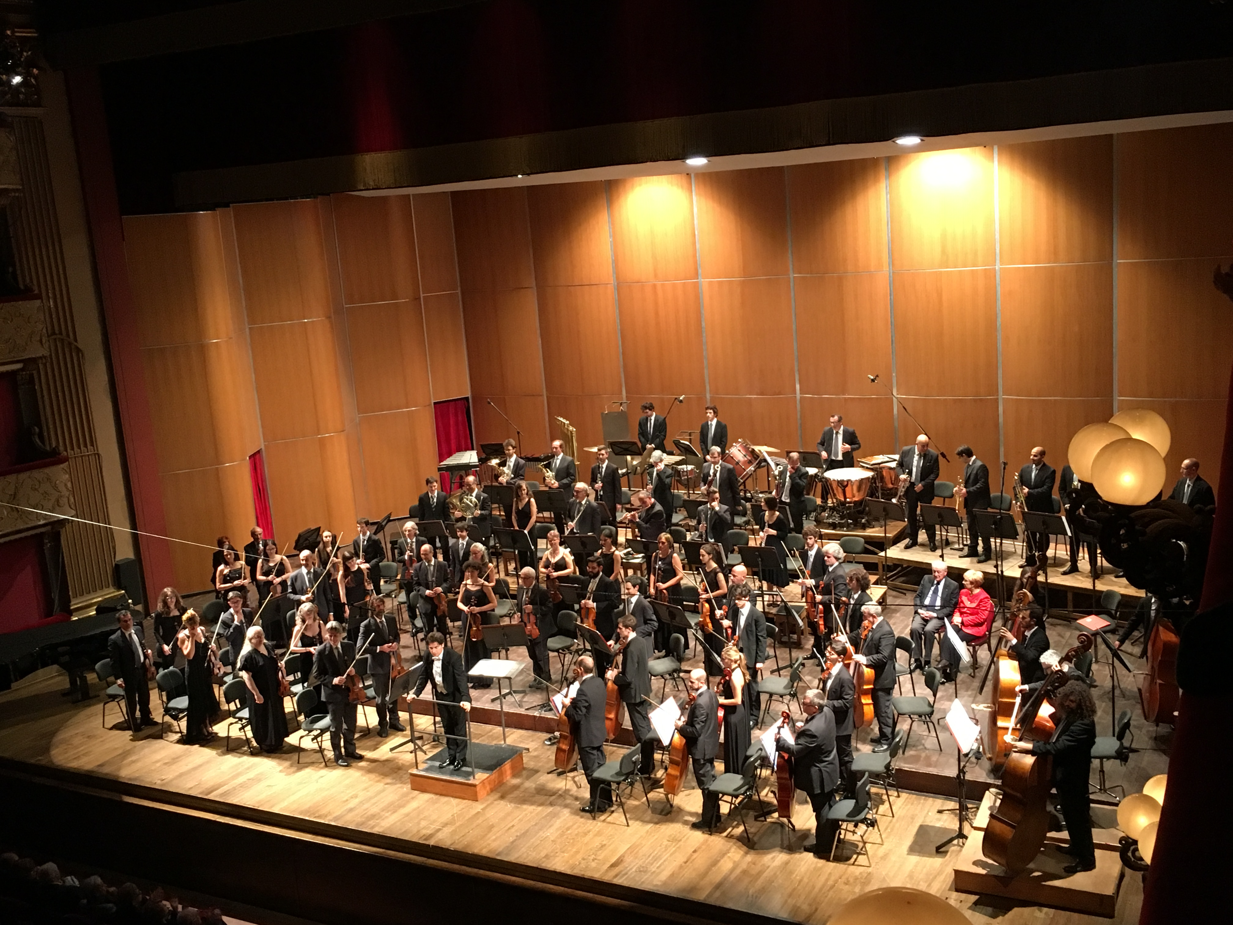 Orchestra regionale Toscana, direttore Daniele Rustioni